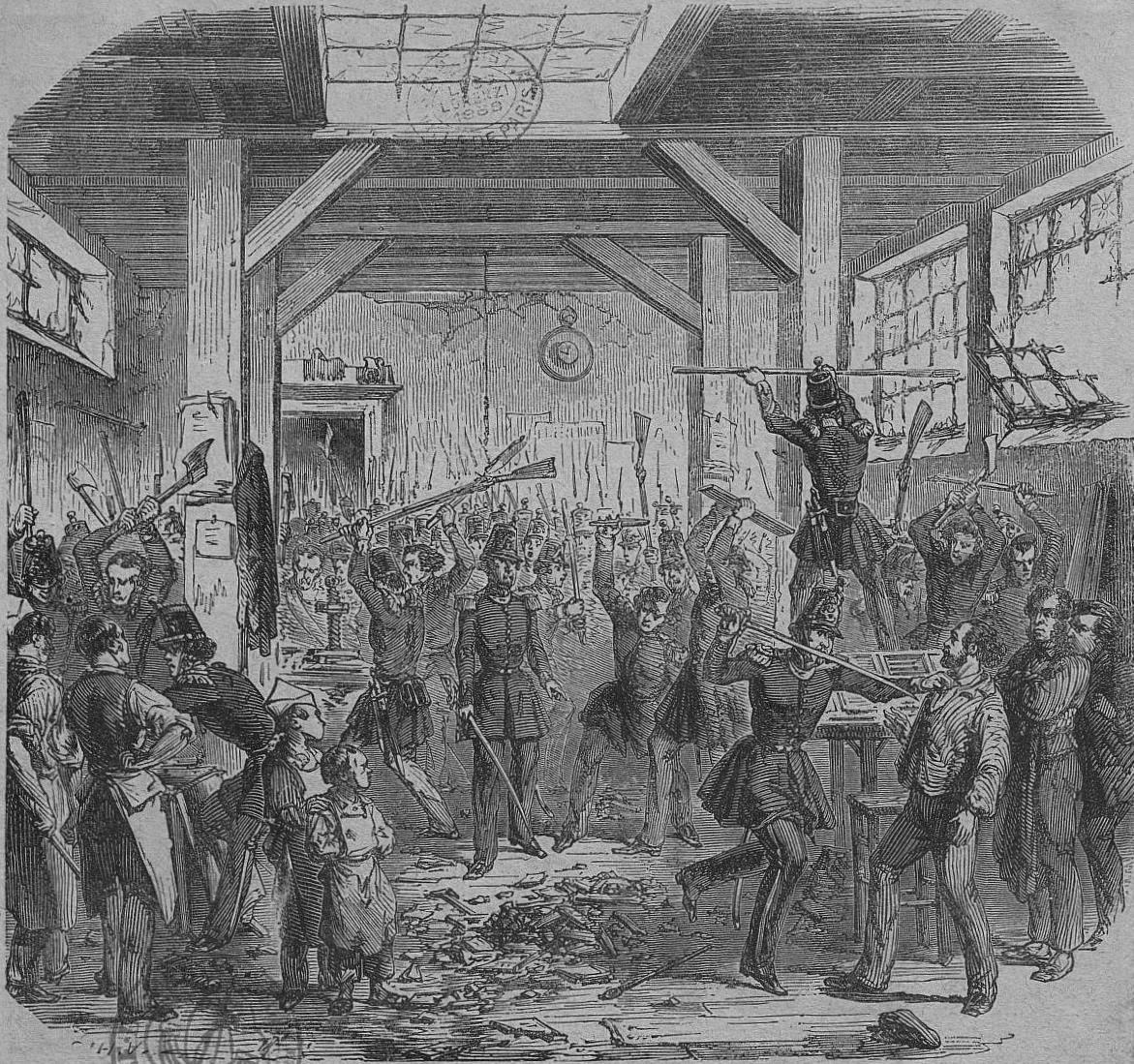 "Dévastation de l'imprimerie de la rue Coq-Héron", le 13 juin 1849.